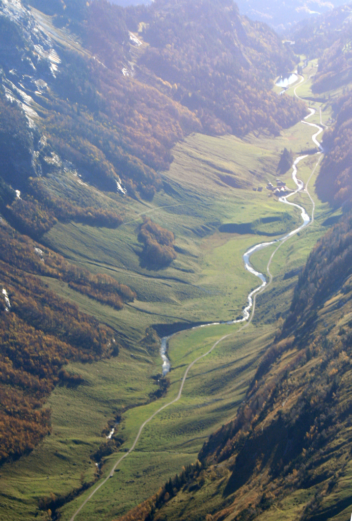 Gental, Luftaufnahme